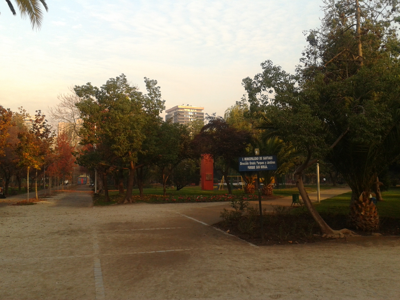 Parque San Borja, Santiago de Chile.